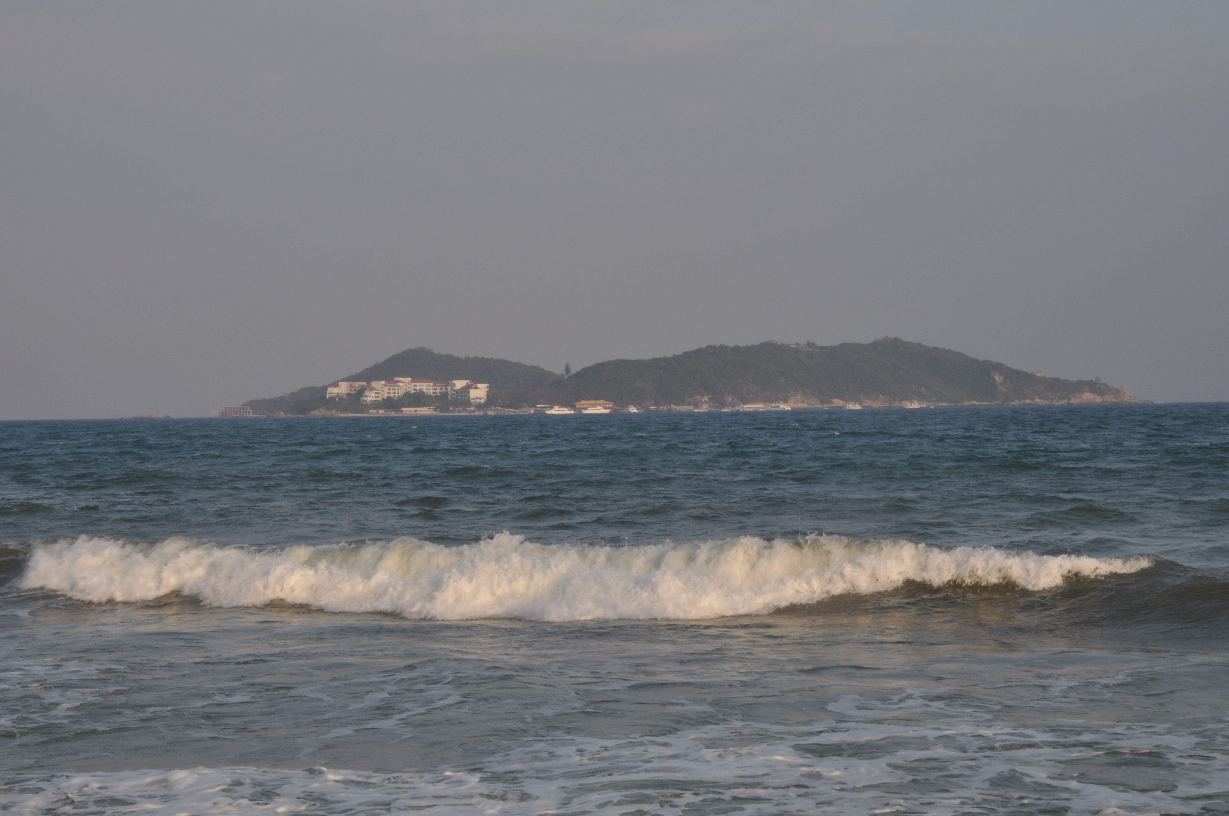 海棠湾2014春节 liuzusai